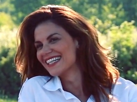 2013 yılında Tülin Şahin'in de oynadığı reklam filminden bir kare